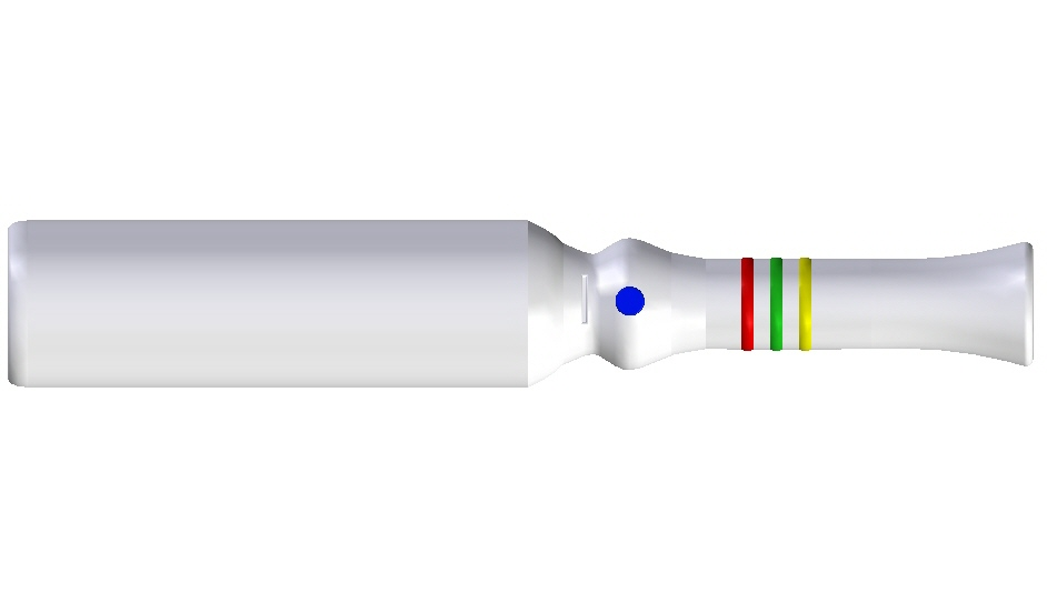 Getekende ampul met OPC cut en punt en 3 color rings.